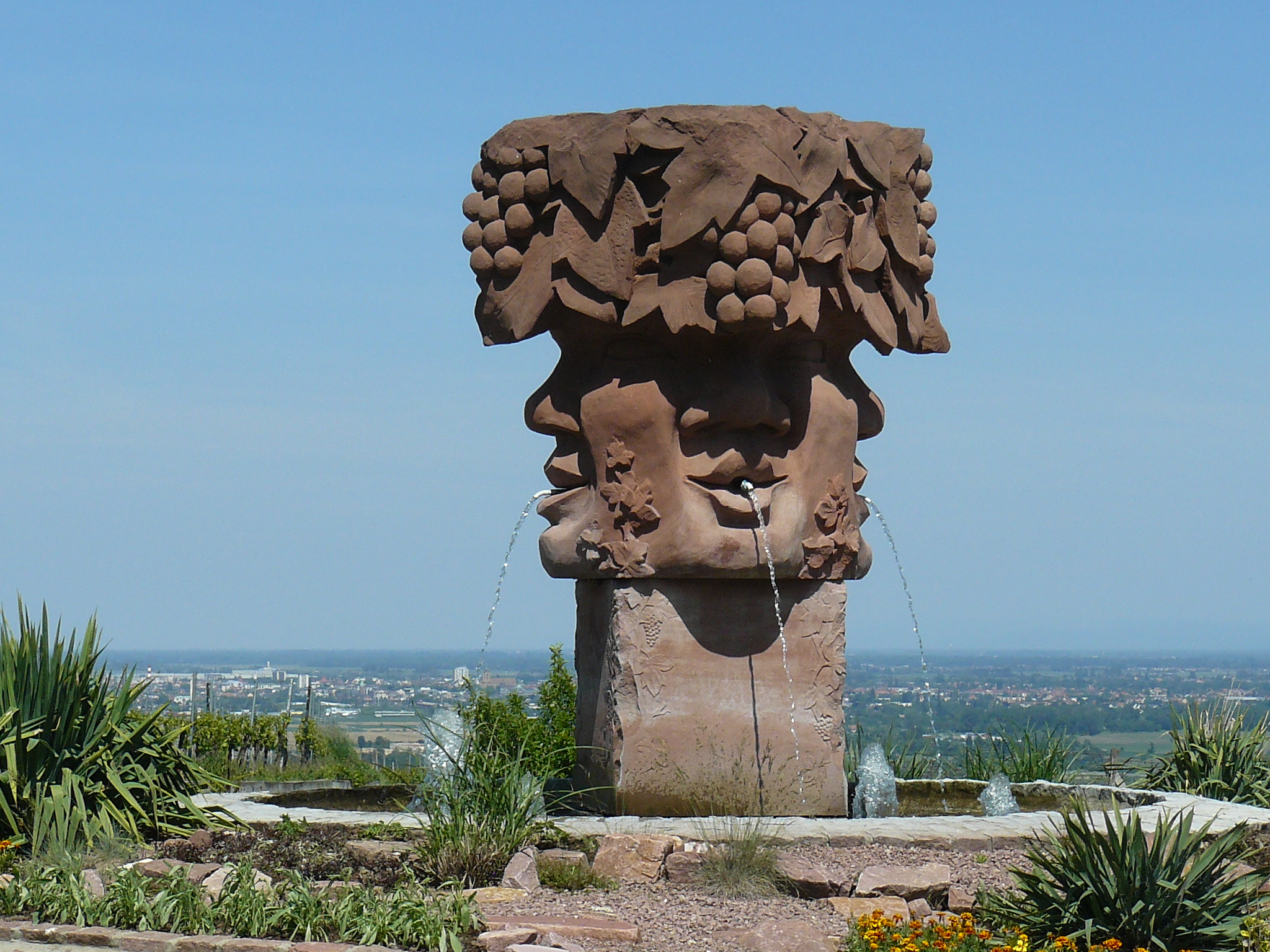 Fontaine à quatre faces à l'entrée du village